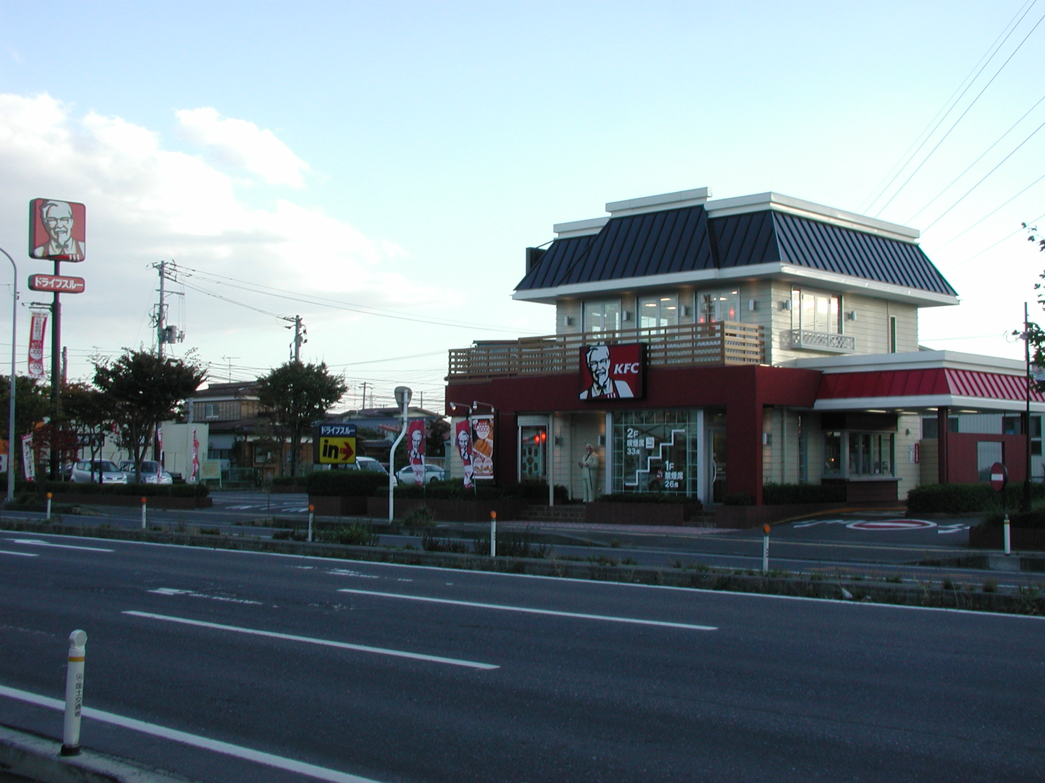 ケンタッキーフライドチキン 八戸石堂店